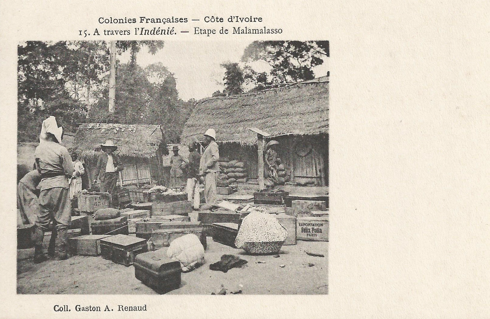 A travers l'Indénié. Etape de Malamalasso, aujourd'hui Aboisso Comoé [1]. Colonies françaises. Côte d'Ivoire